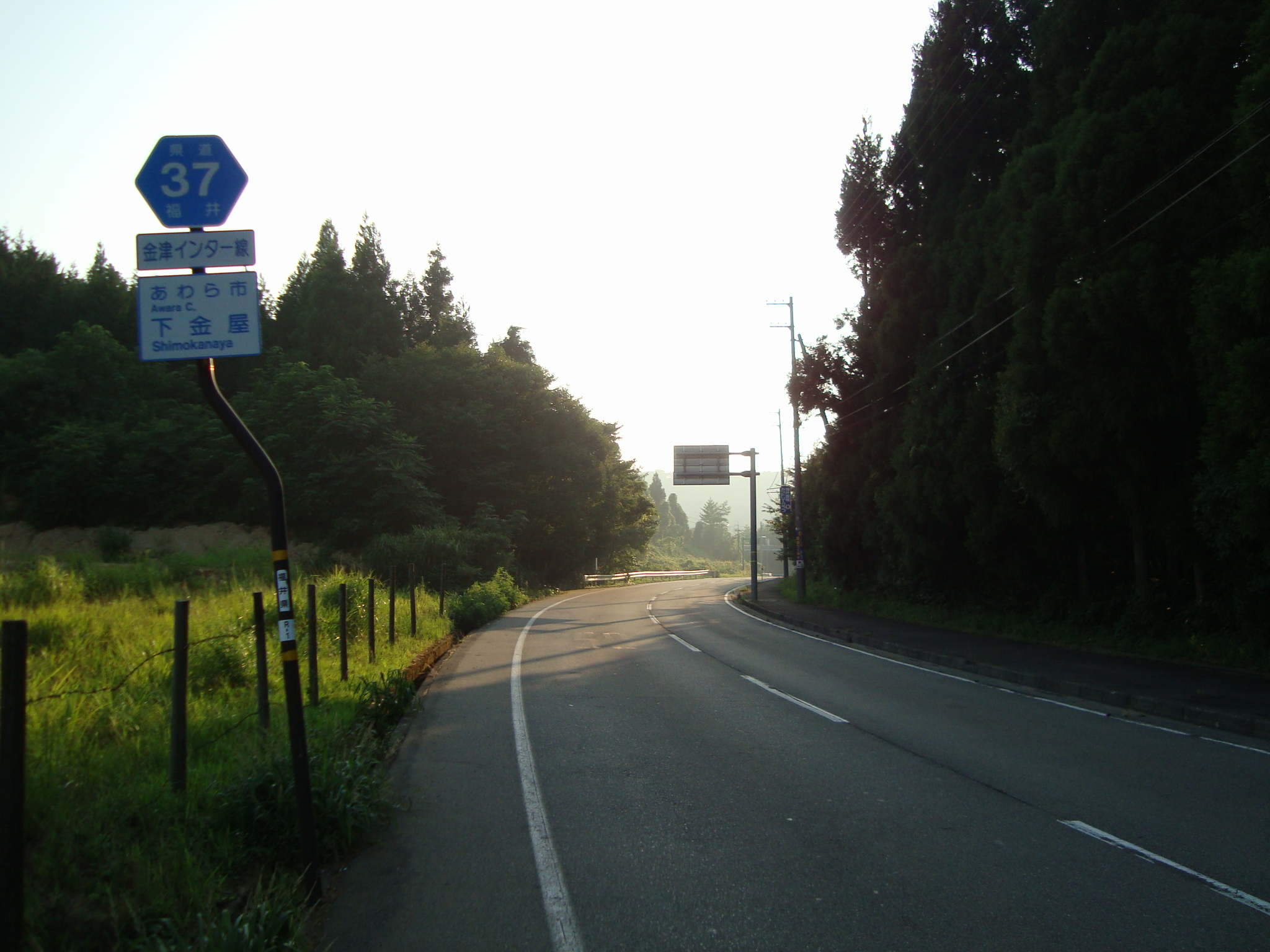 福井県道37号金津インターチェンジ線 福井県あわら市下金津付近